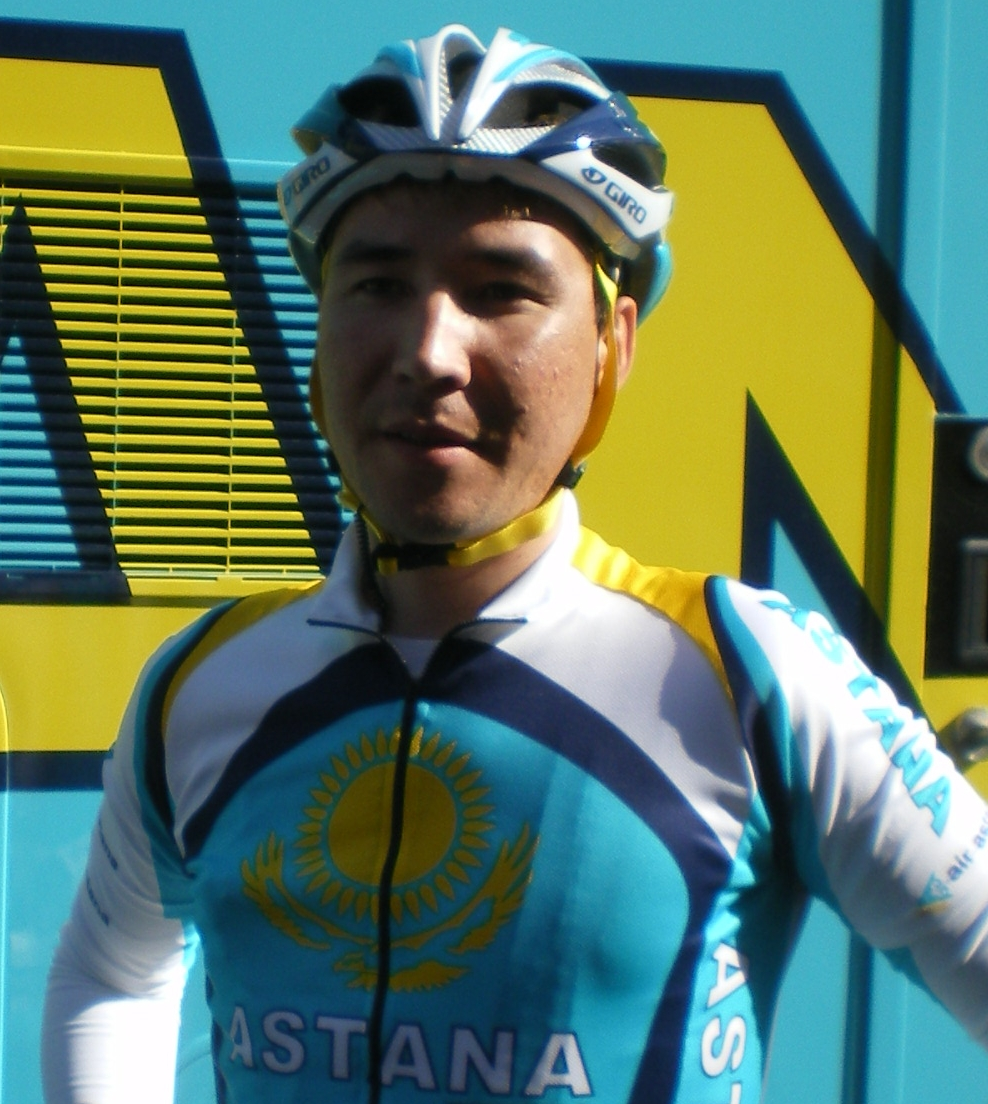 Berik Kupeshov - 3daagse van West Vlaanderen 2008